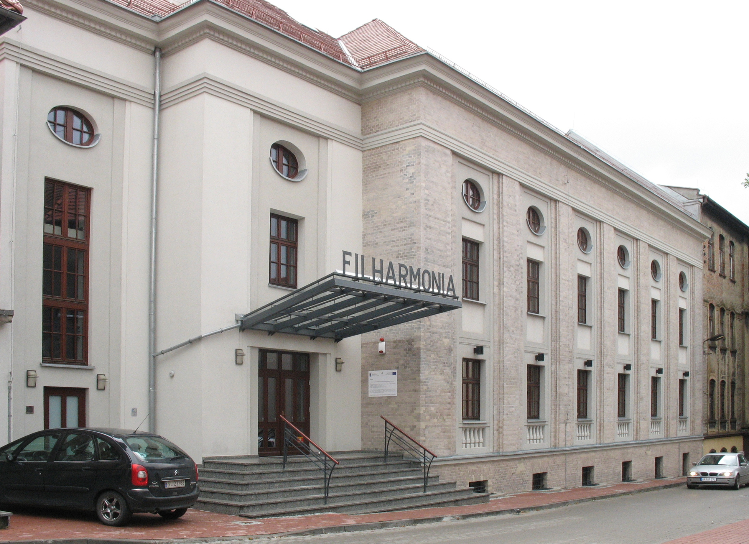 Budynek dawnej biblioteki, od 2010 roku siedziba zabrzańskiej filharmonii.